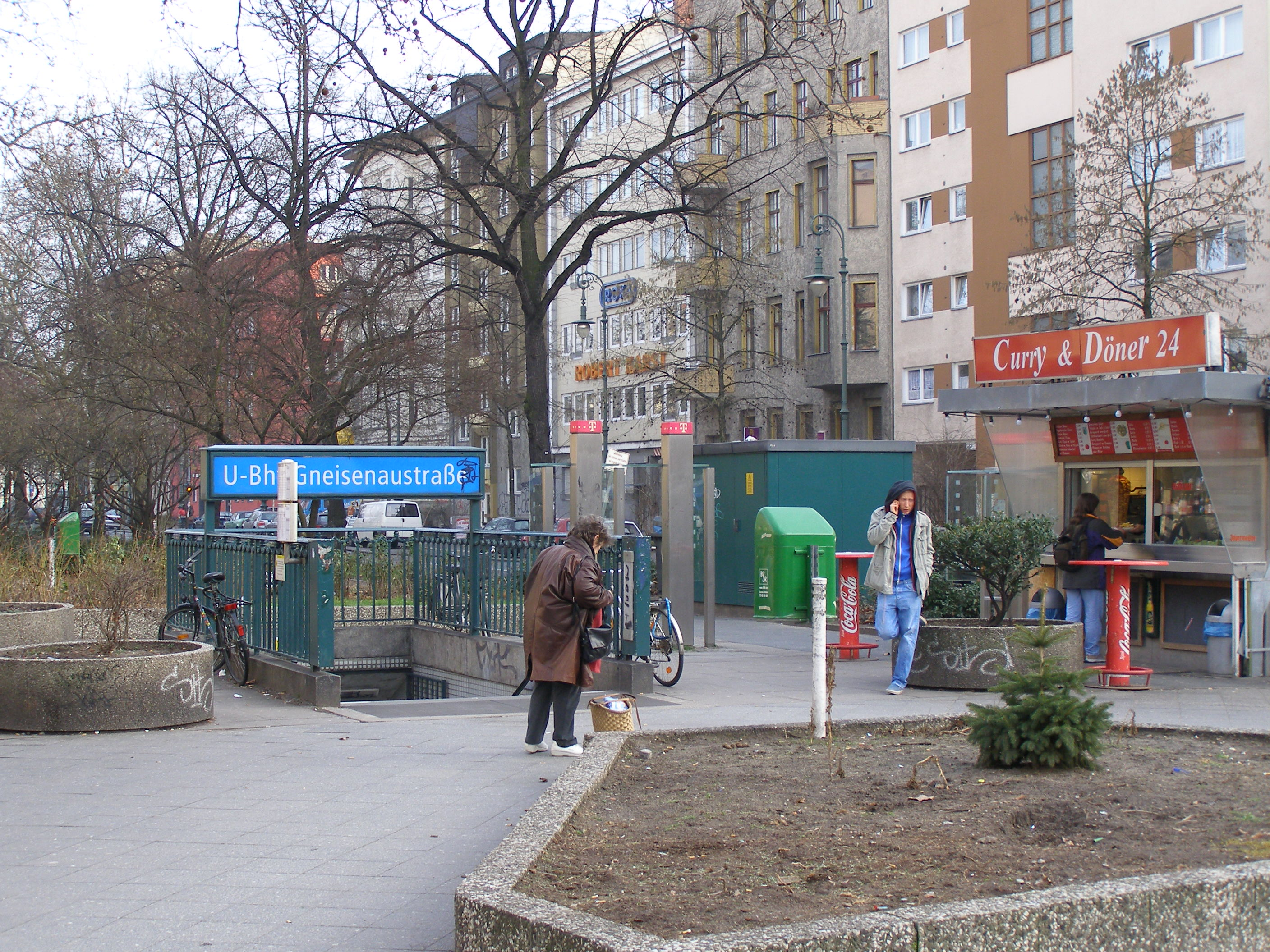 Gneisenaustraße, Berlin (Kreuzberg) U-Bahn-Eingang / underground entrance